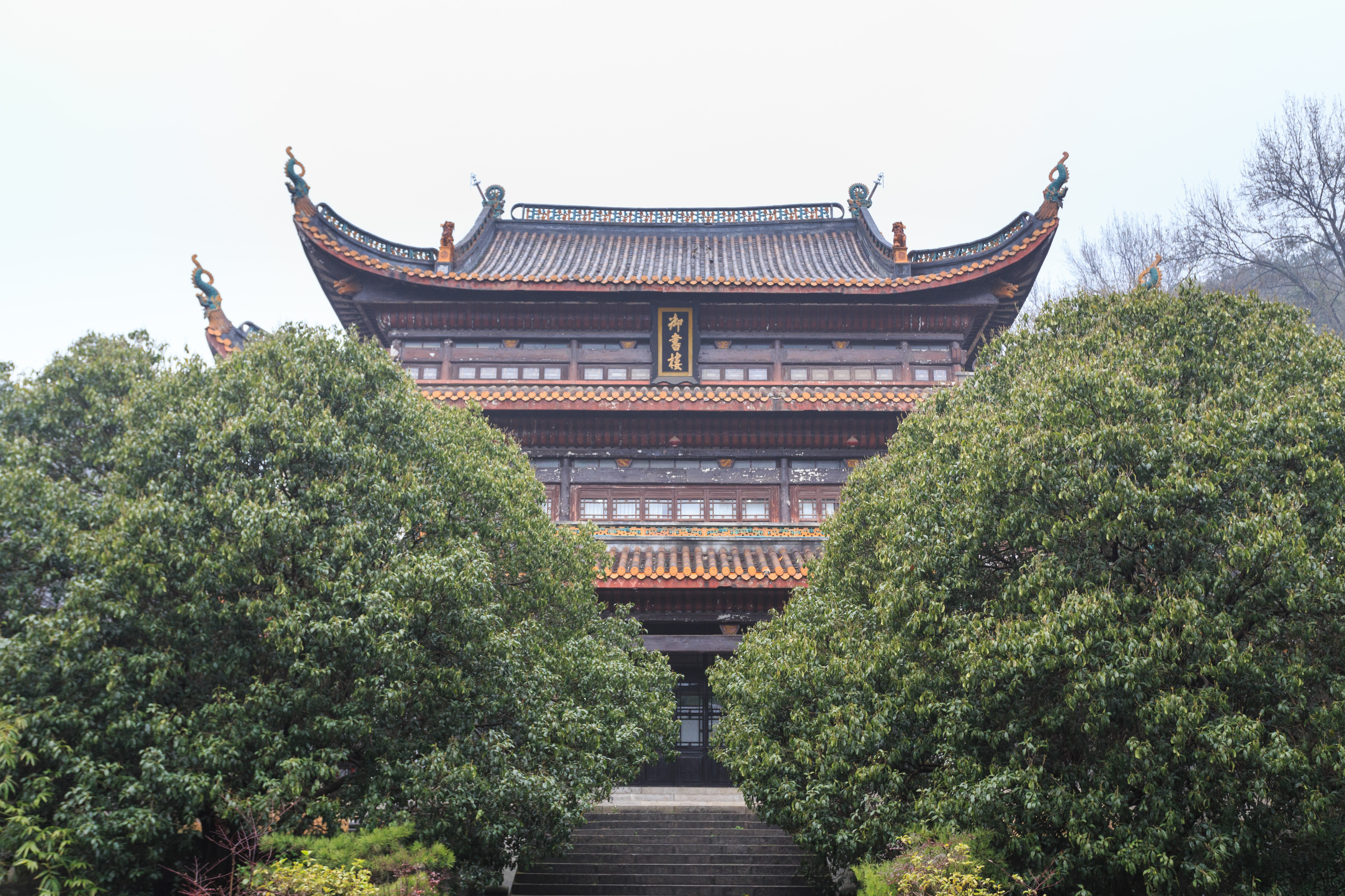 嶽麓書院 御書樓